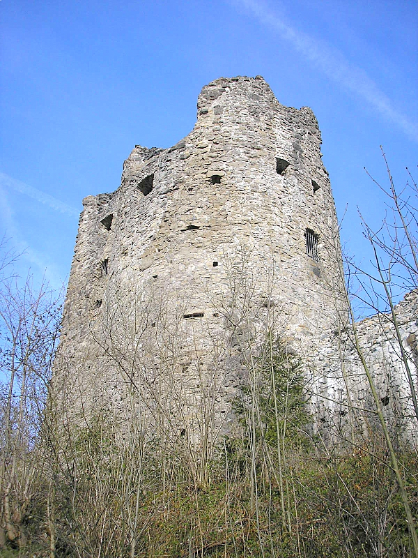 Burg Laubenbergerstein bei Immenstadt im Allgäu (Landkreis Ostallgäu). Der Hauptturm von Südwesten. Eigene Aufnahme, April 2008 / Laubenbergerstein castle near Immenstadt (Landkreis Ostallgäu, Bavaria, Germany). The keep from the south west. Own photo, April 2008